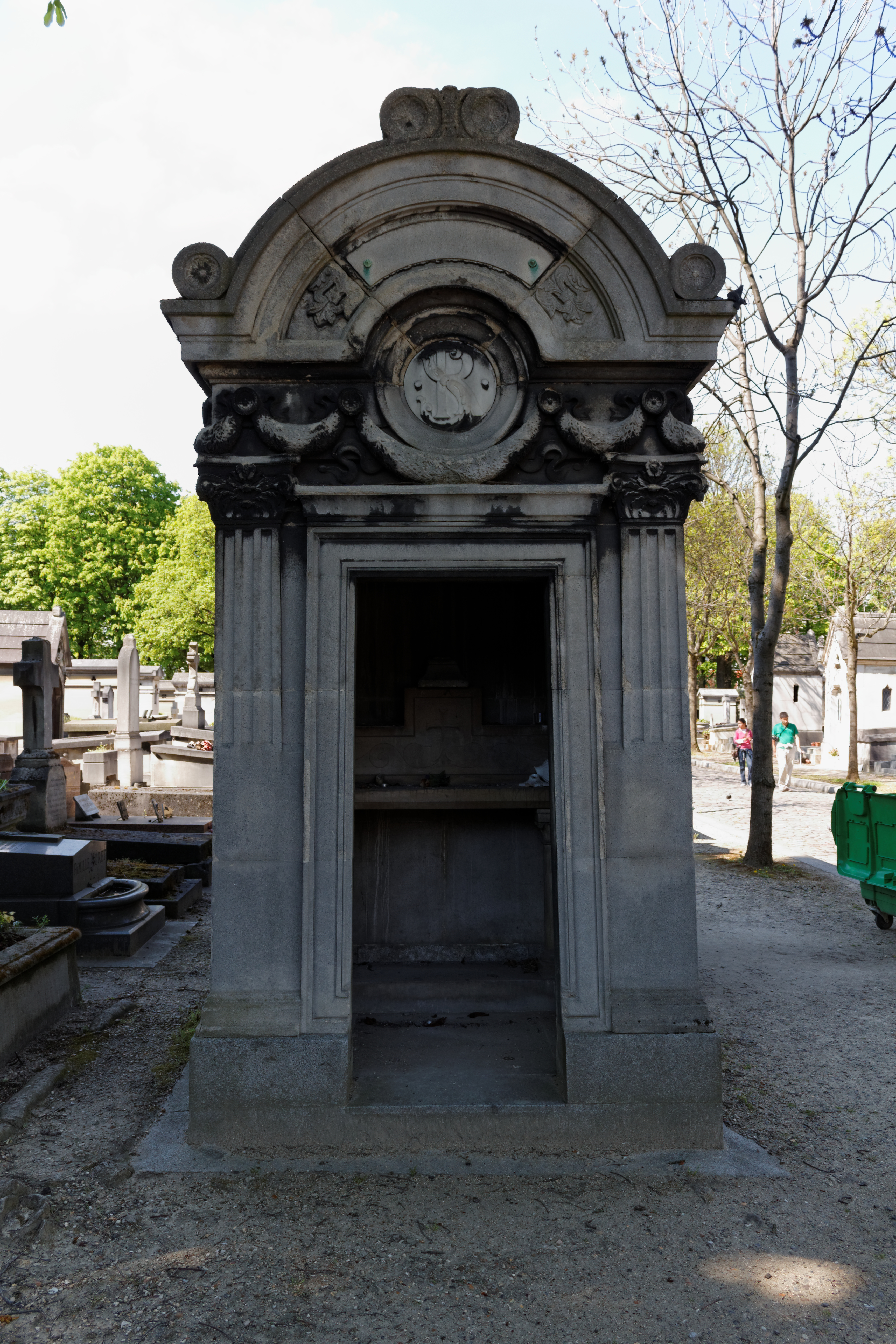 Vue d'ensemble